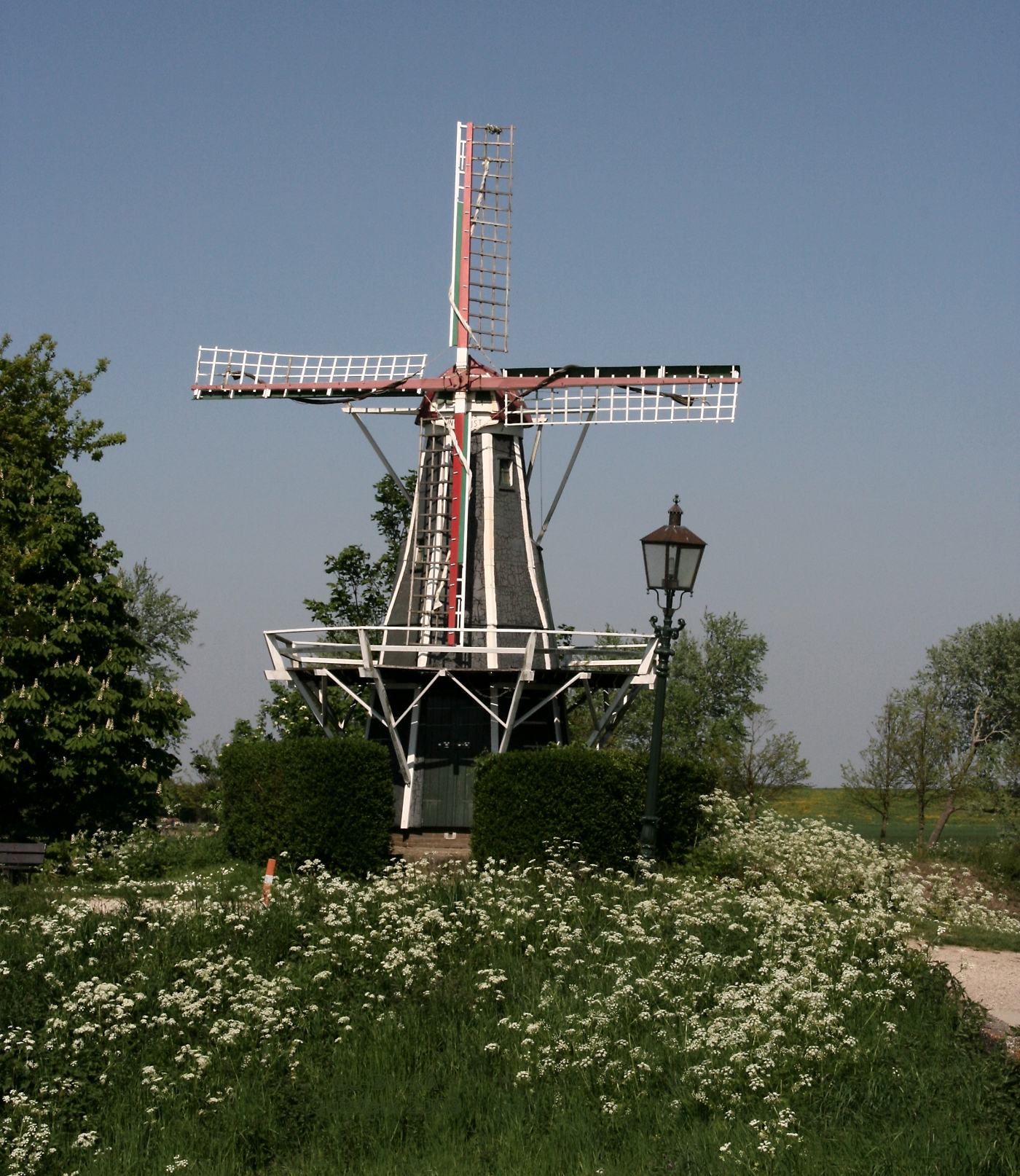 Brouwershaven: kleine molen Windlust